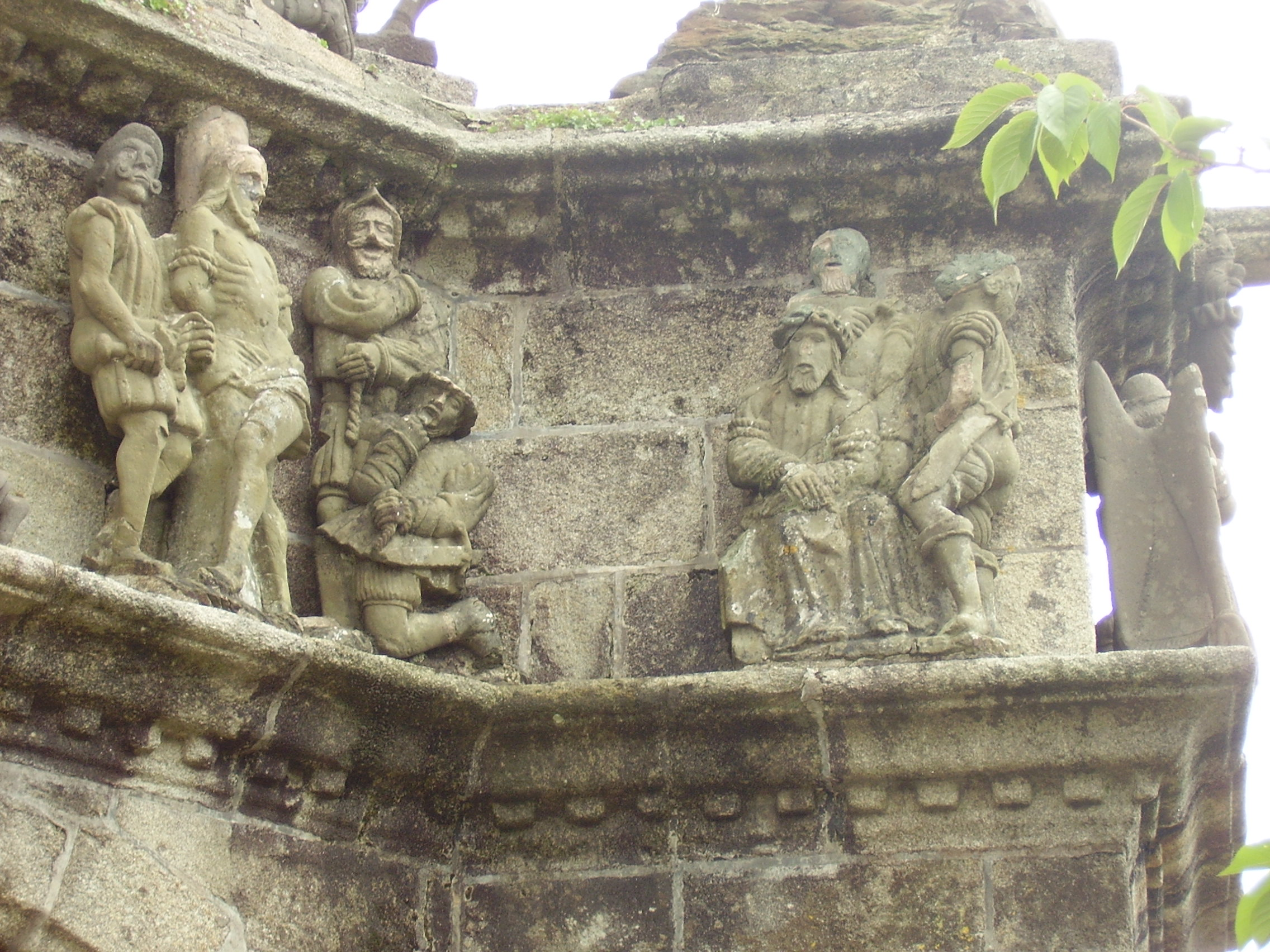 Pleyben, Pfarrbezirk mit monumentaler Calvaire und Kirche, Frankreich; Calvaire